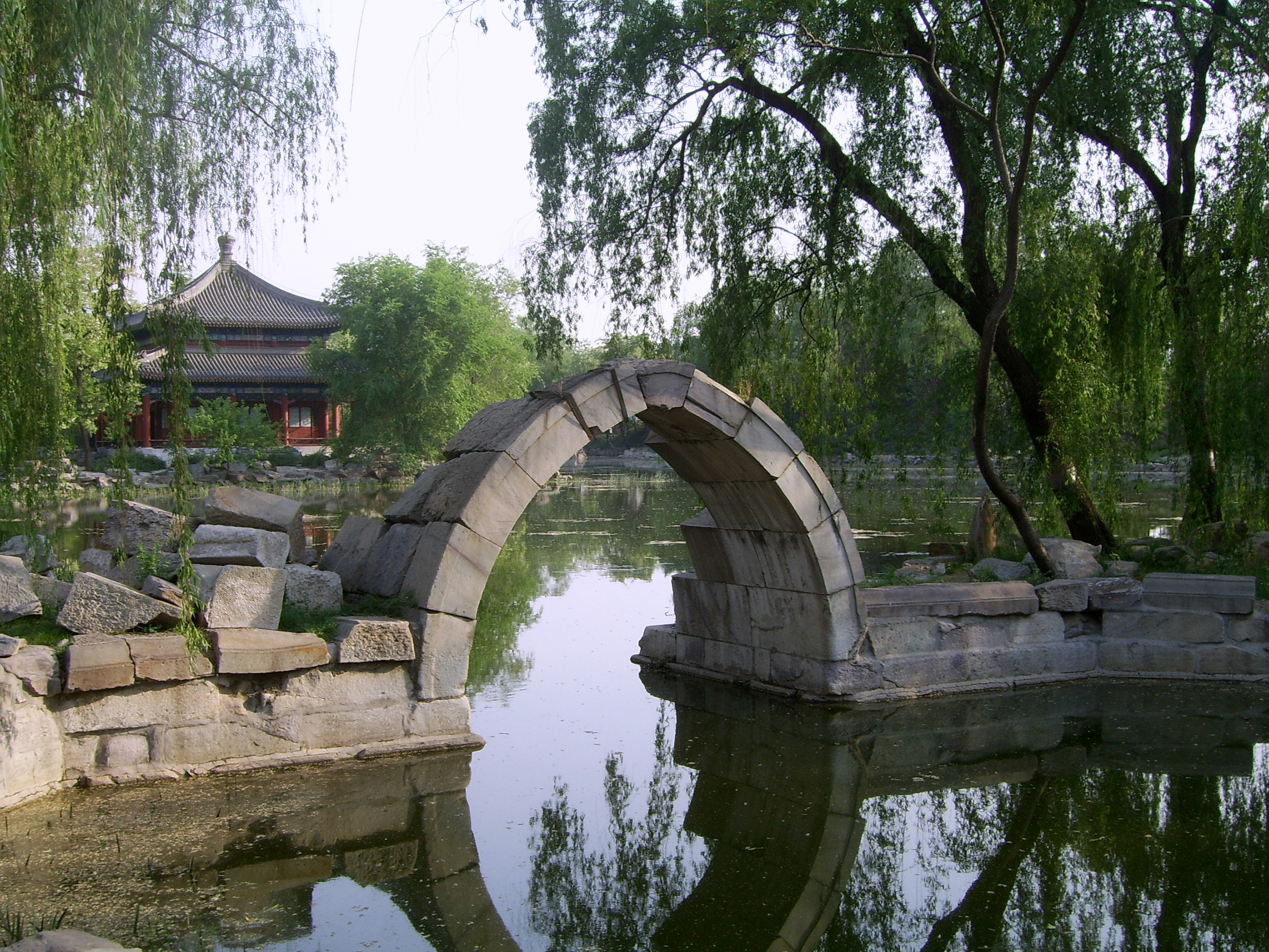 圆明园遗址公园现仅存的单孔石拱残桥，在鉴碧亭北侧。